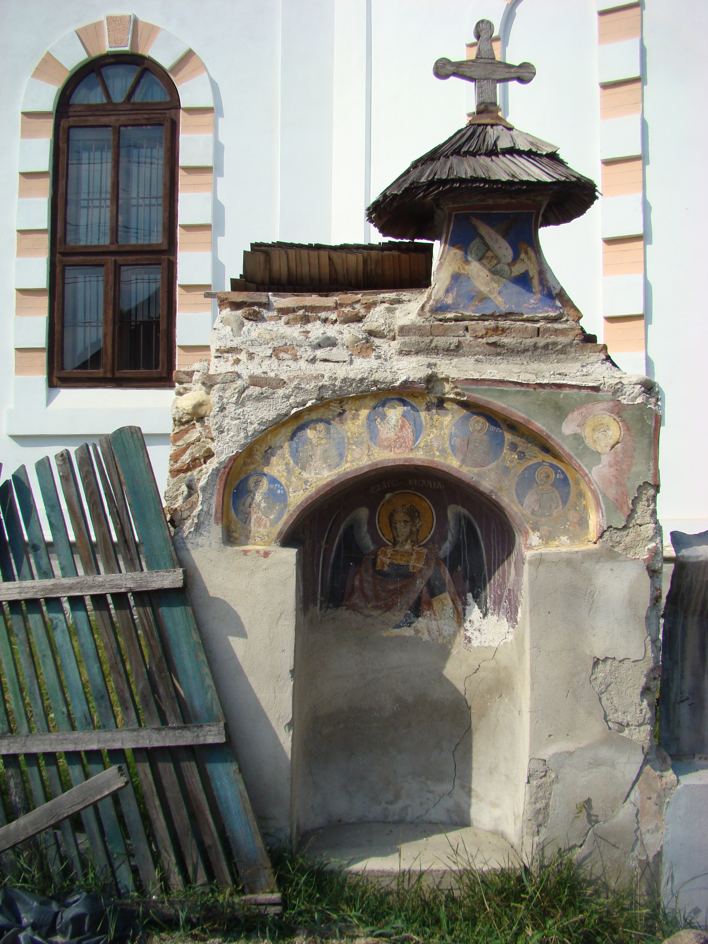 Biserica "Intrarea în Biserică a Maicii Domnului" - Domneștii de Sus, sat Domnești; comuna Domnești, județul Argeș 02